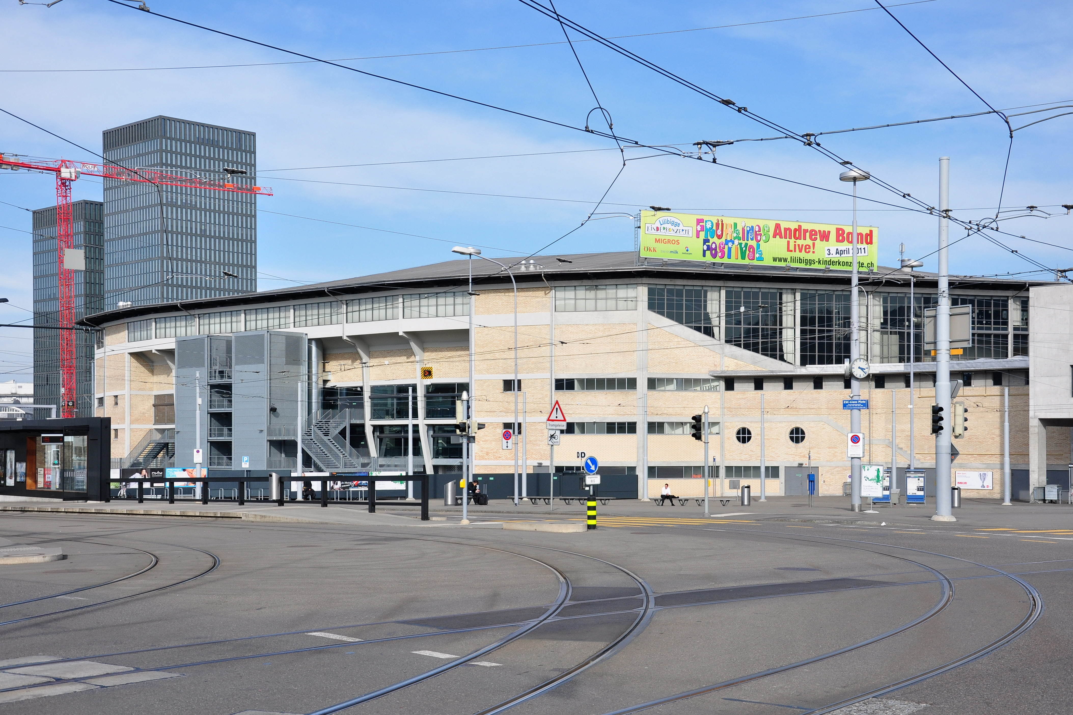 Hallenstadion - Messe Zürich in Oerlikon (Switzerland)